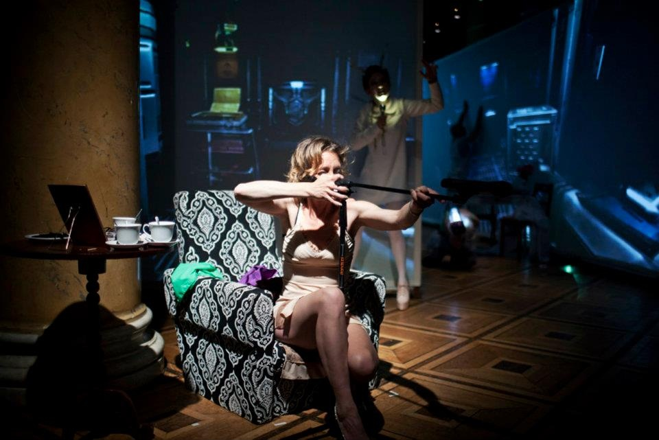 לני שחף בהצגה רוחות מורנוב